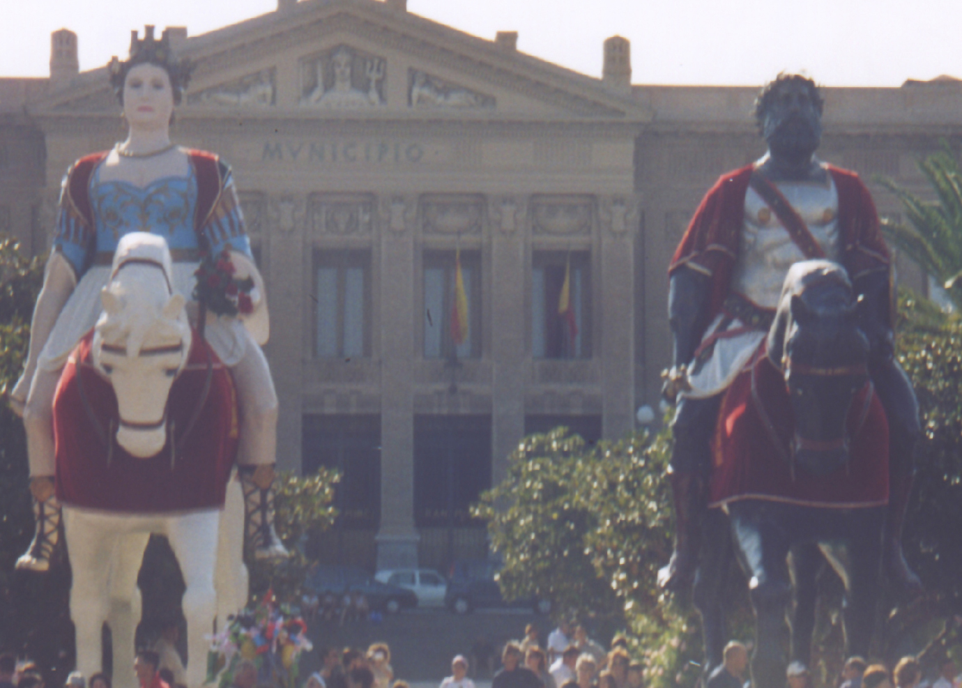 "Mata e Grifone" procession in Messina